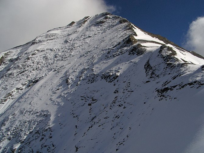 Großes Wiesbachhorn, Nordwestwand. ehemals berühmte Eiswand